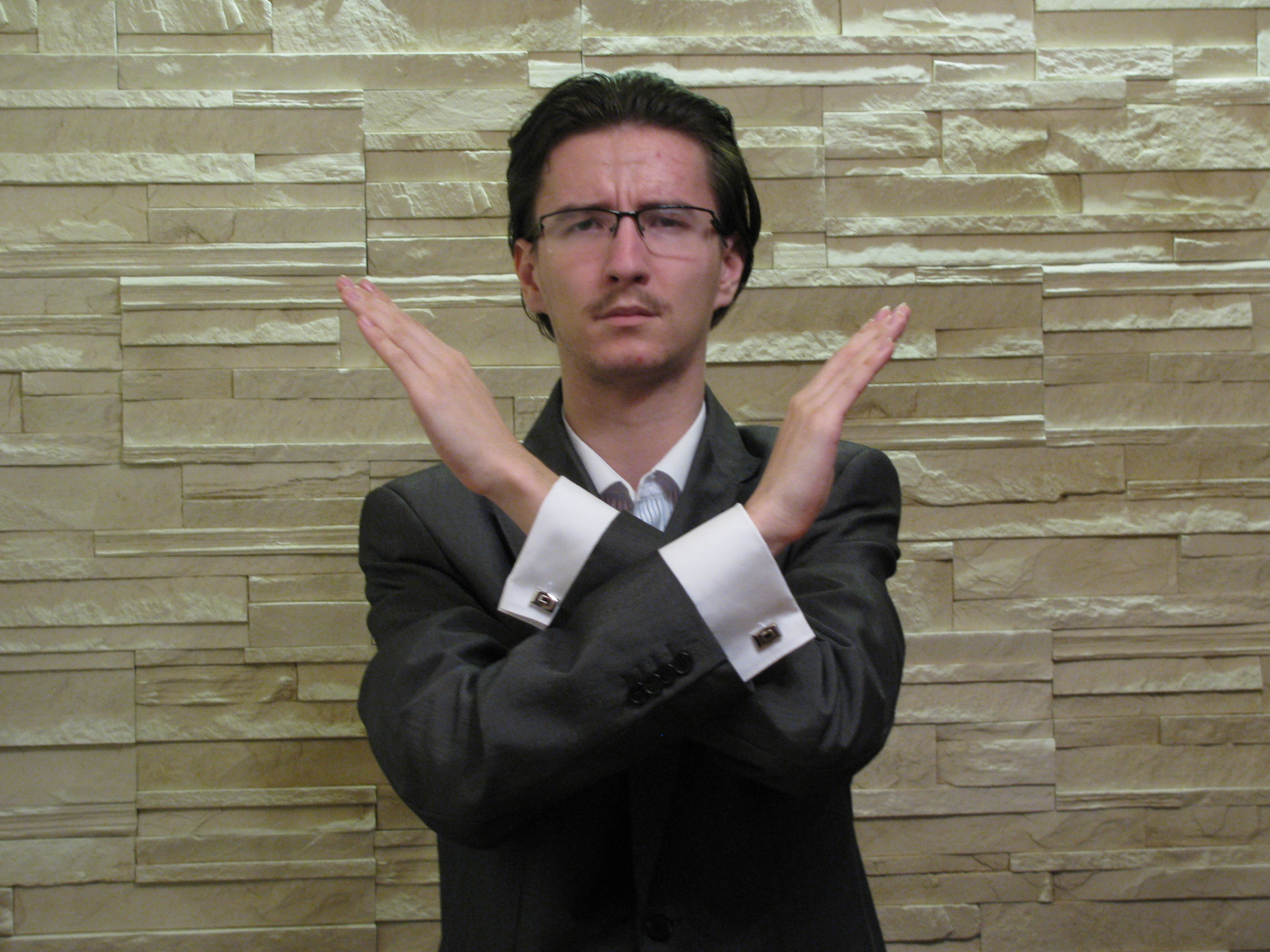 zmiana